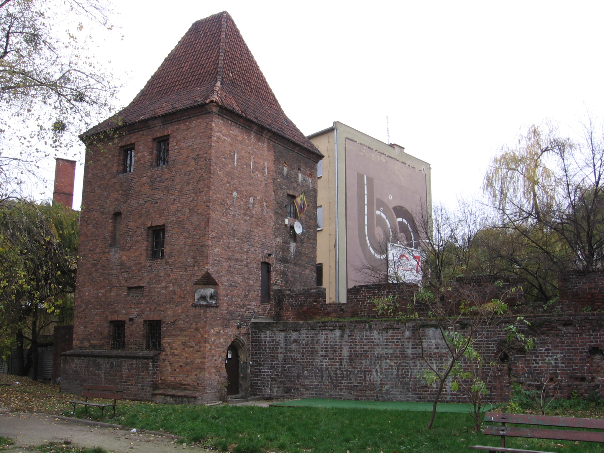 Baszta Niedźwiadka we Wrocławiu, widok od strony podwórek budynków przy ul. Piaskowej